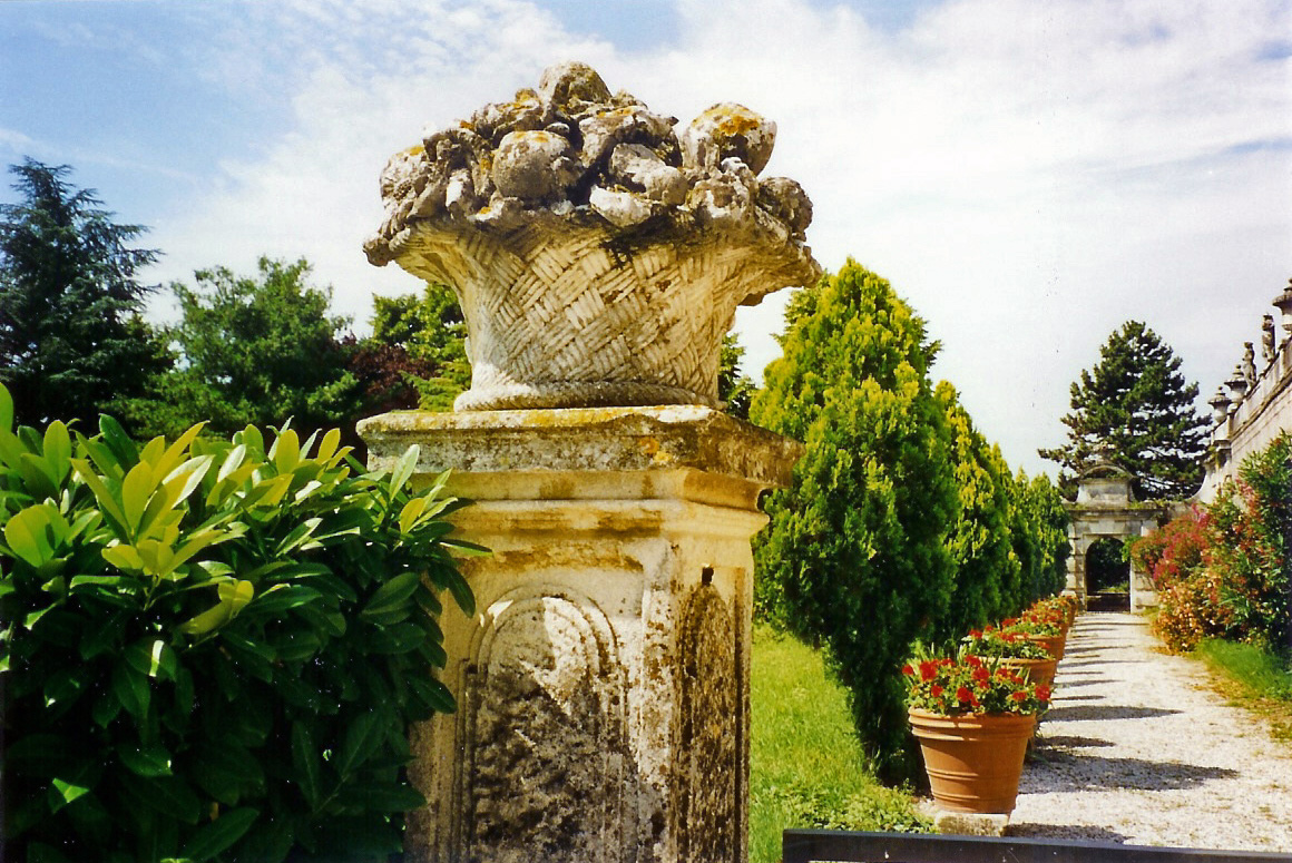 Villa Cordellina Lombardi-decoration